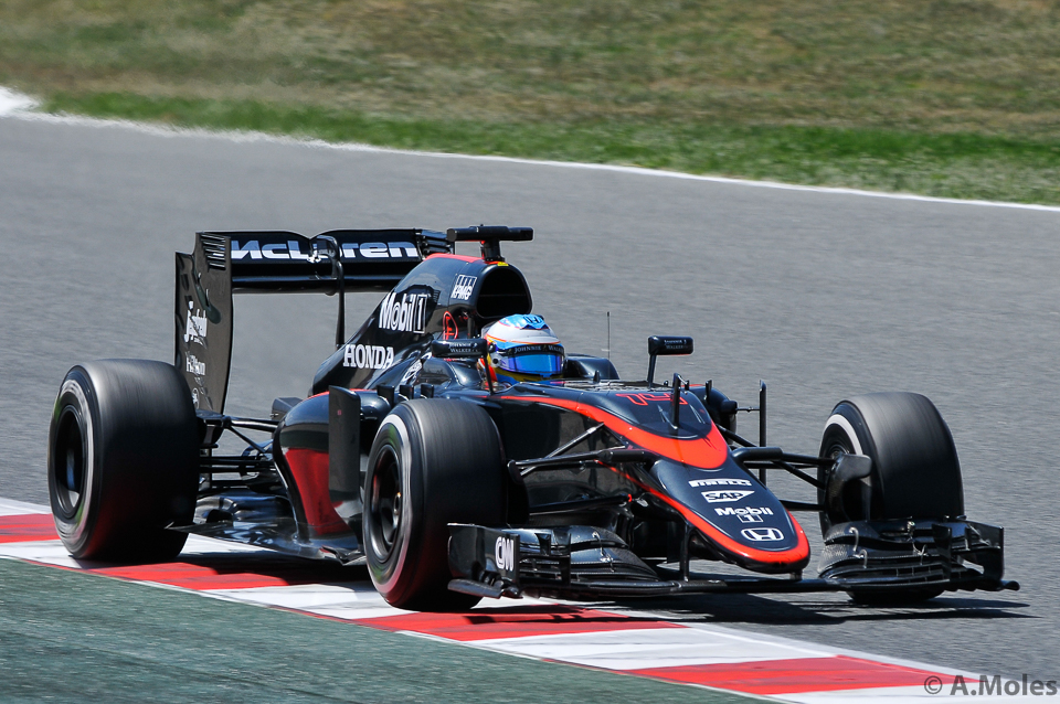 GP Formula 1-25.jpg